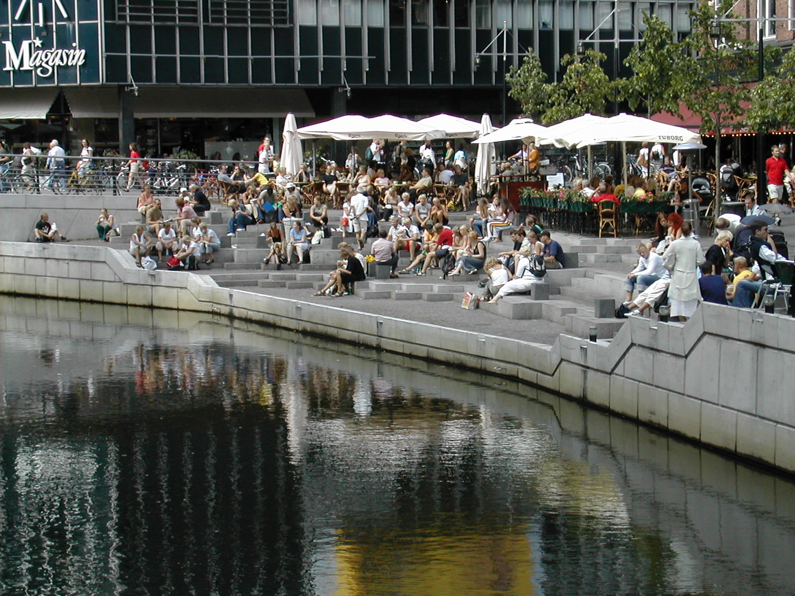 Århus, Denmark.